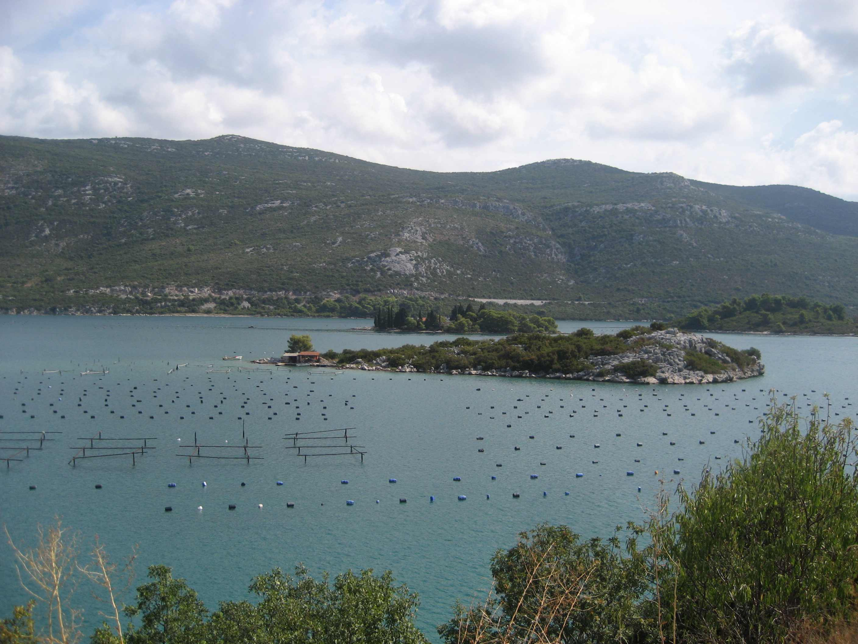 Muschelzucht in Ston, Kroatien